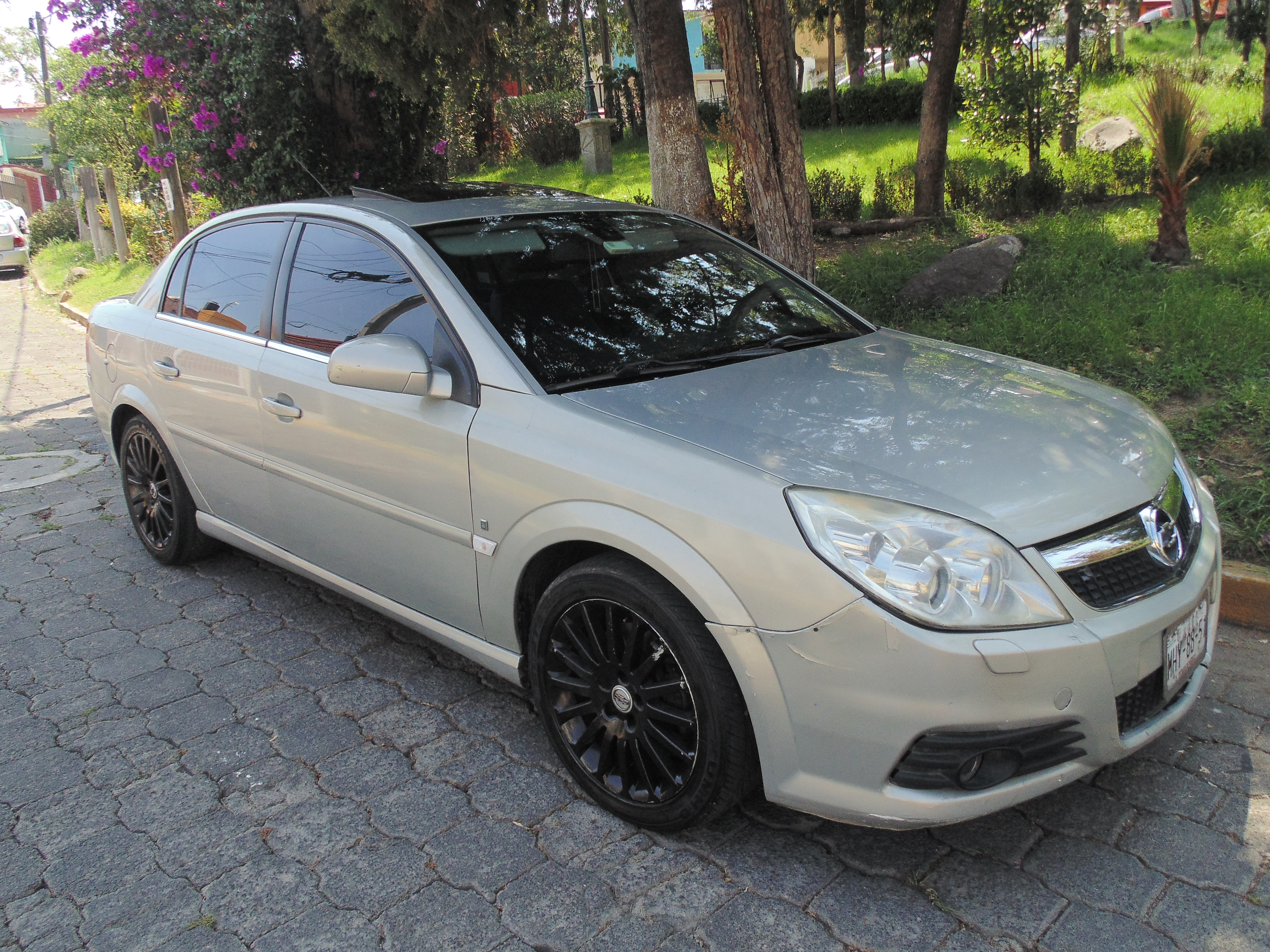 Vectra Elegance V6 turbo